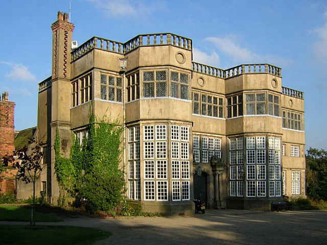 Astley Hall